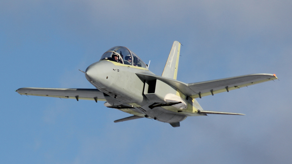 Самолет СР-10